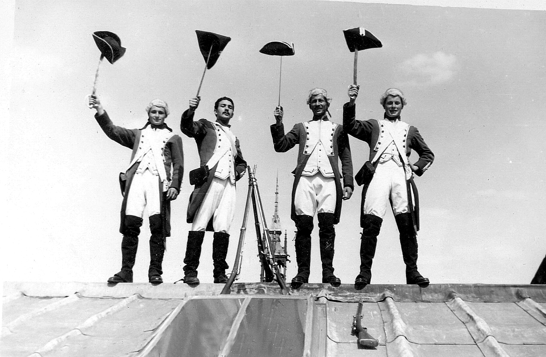 Étudiants de l'ancienne école vétérinaire de Toulouse sur les toits du Théâtre du Capitole, après une figuration dans La Grande Duchesse de Gérolstein